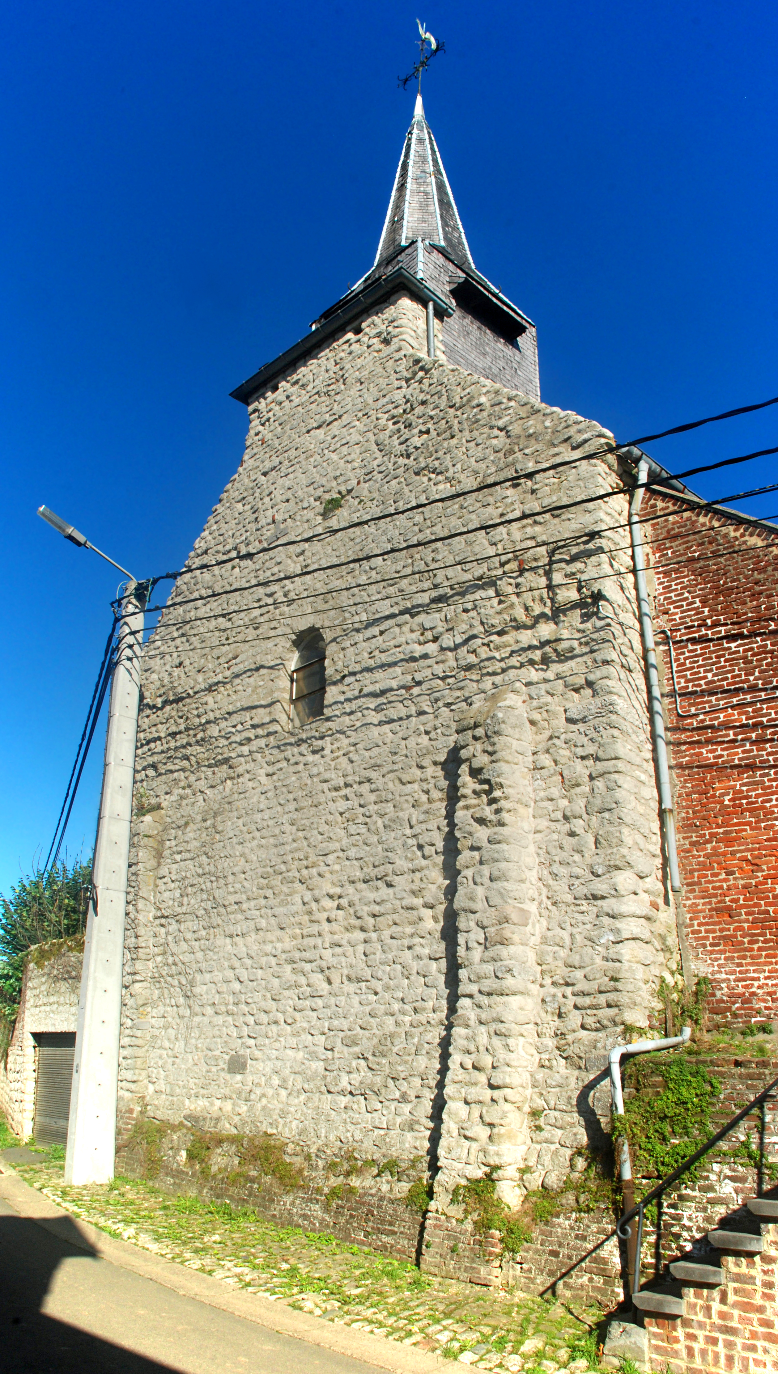 Belgique - Brabant wallon - Nivelles - Eglise Sainte-Marguerite de Thines (roman / gothique / classique / baroque)